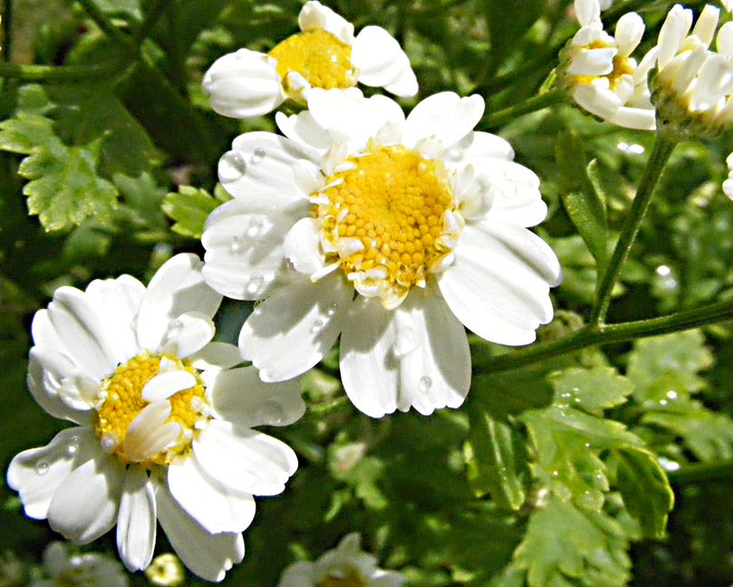 Blüte